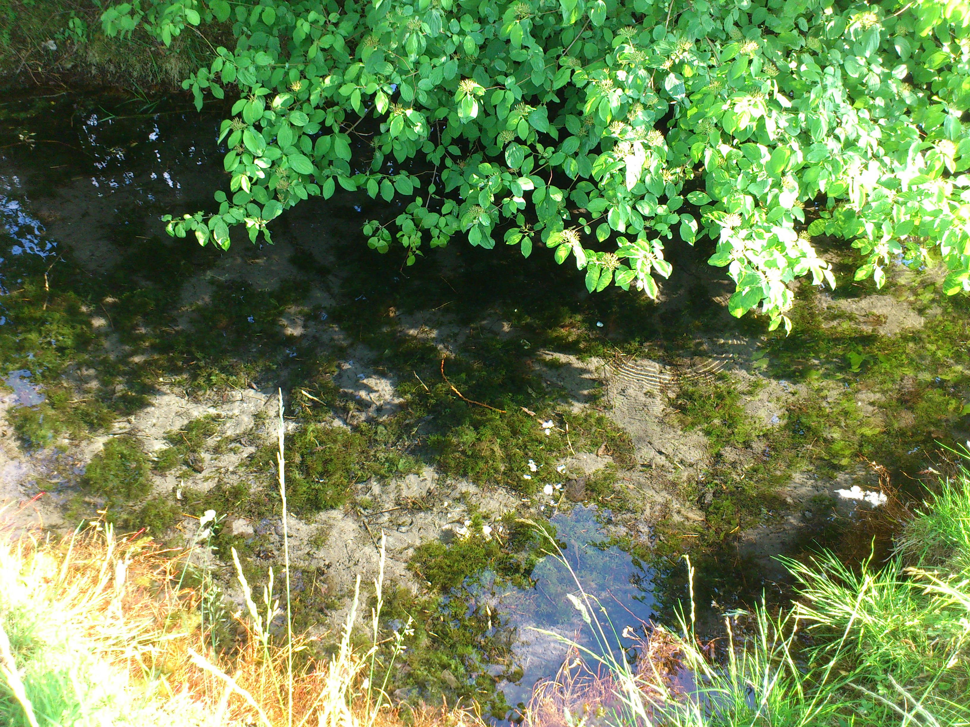 Der Häfeleinsbrunnen bei Bad Windsheim